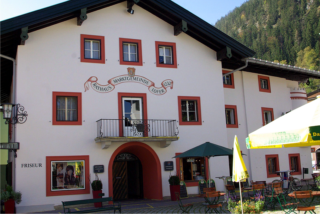 Rathaus, altes Schmiedhaus